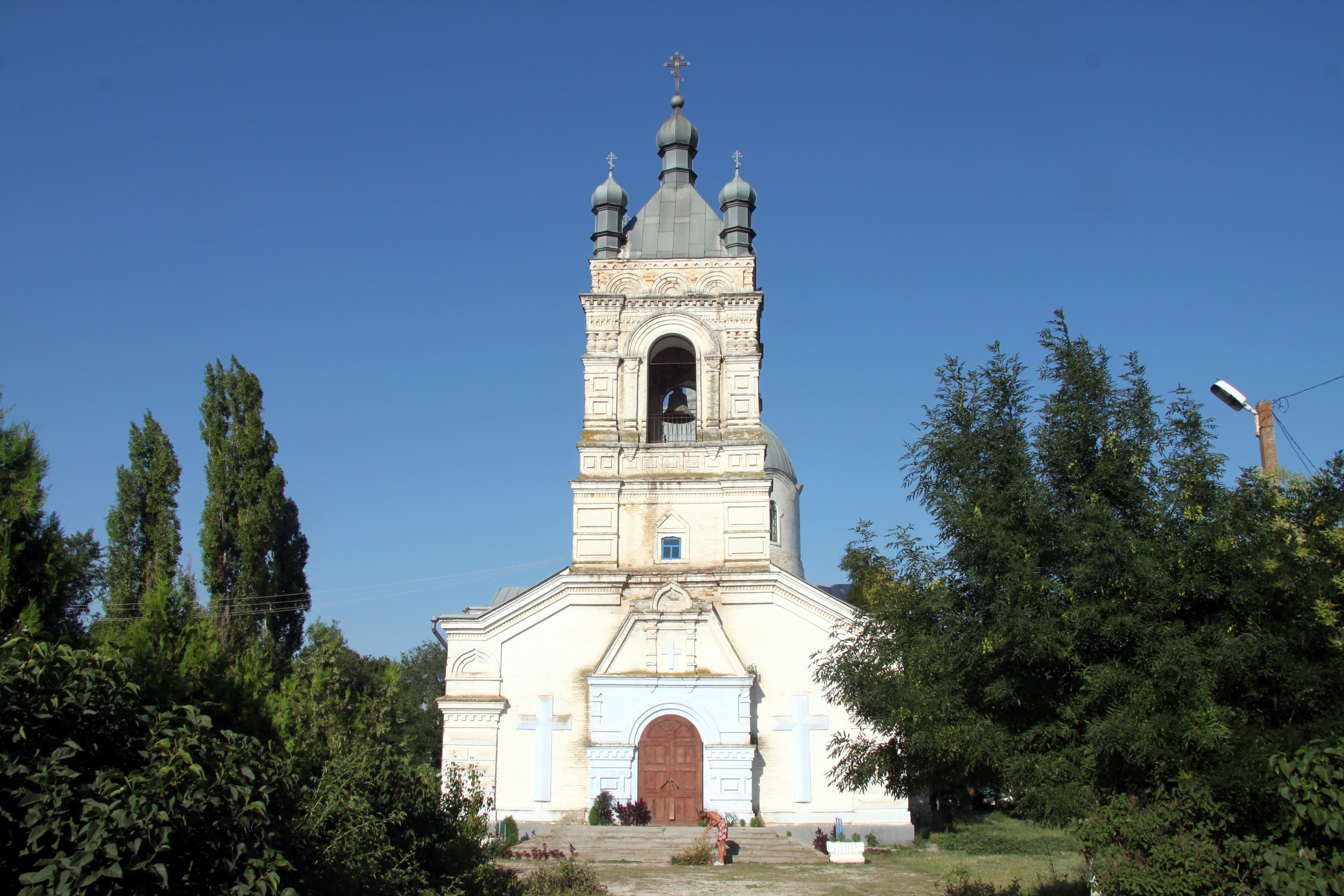 Церква Різдва Богородиці, с. Лиман